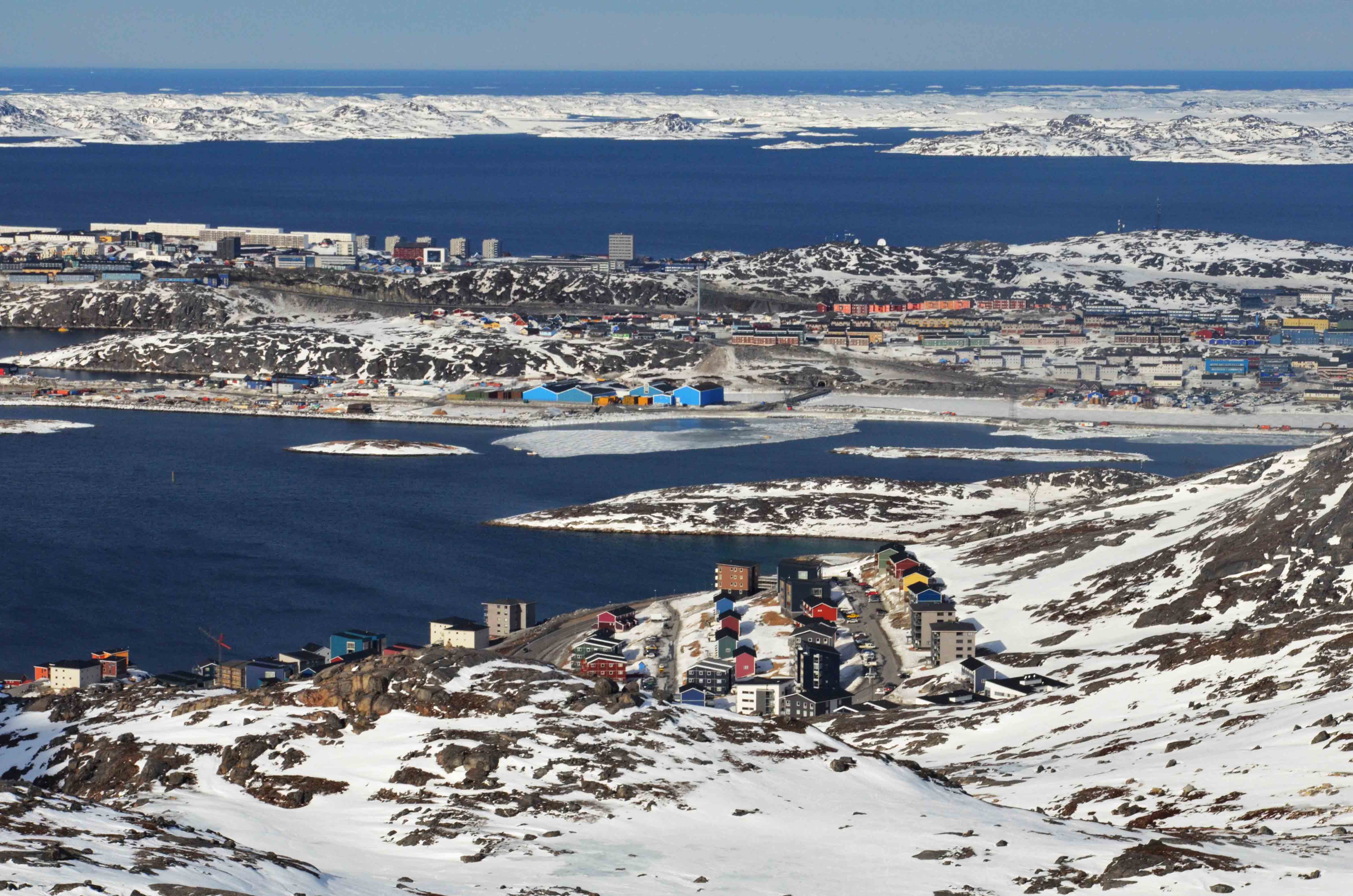 Widok na miasto z góry Ukkusissat.